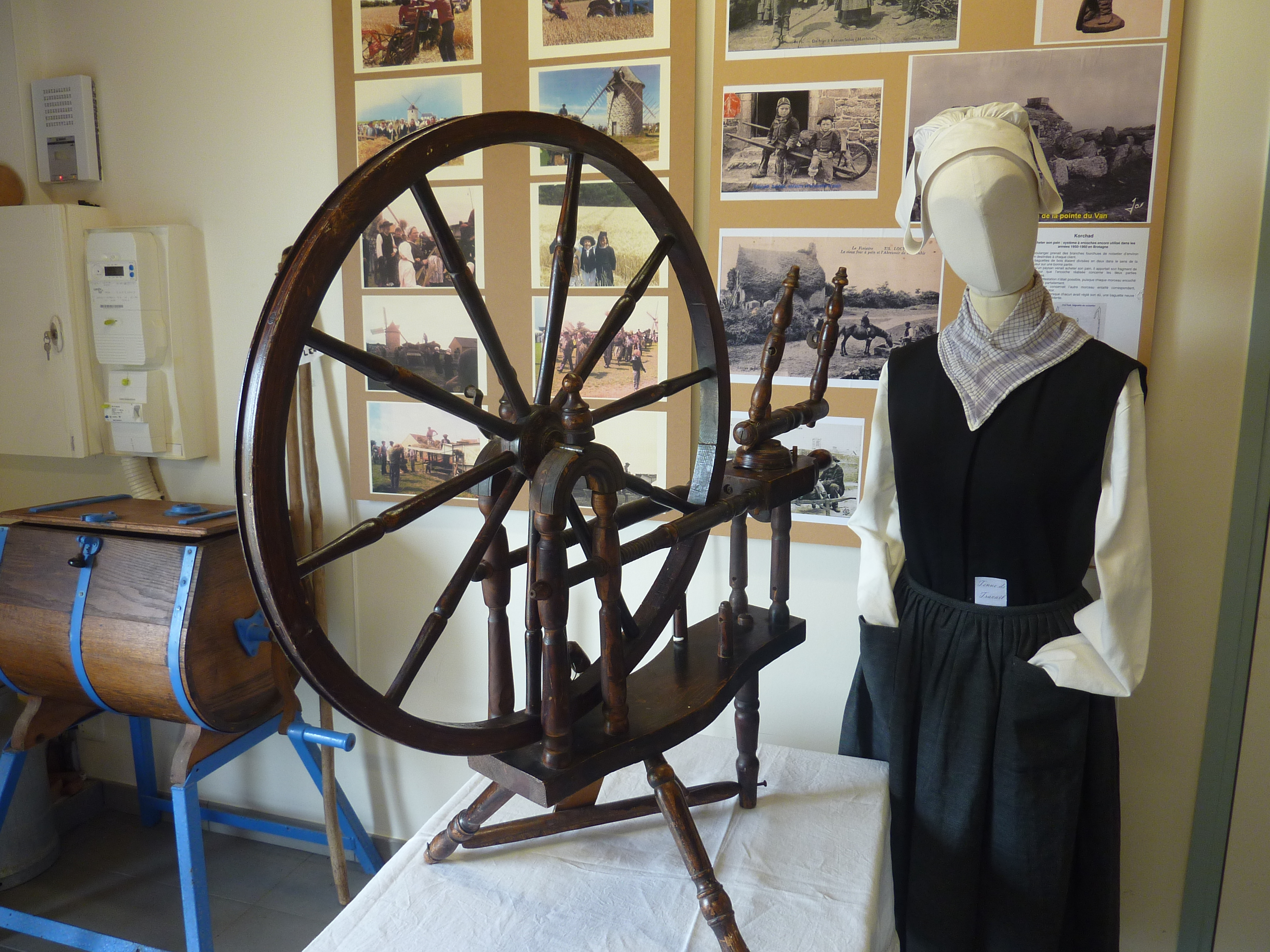 Rouet à lin (exposé au moulin de Trouguer en Cléden-Cap-Sizun).